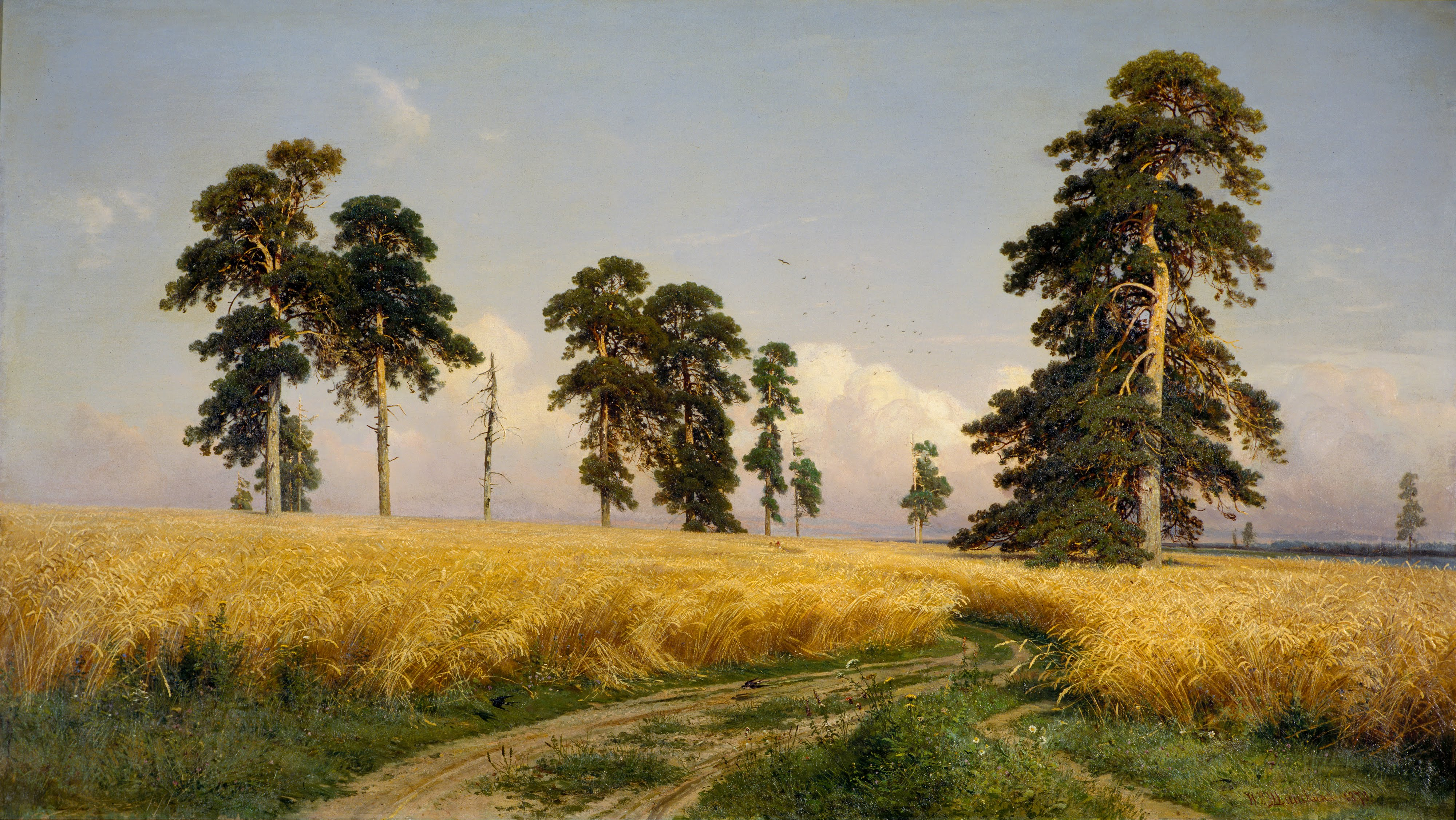 “ Раздолье, простор, угодье, рожь, Божья благодать, русское богатство. ” —И. И. Шишкин, Надпись на эскизе к картине